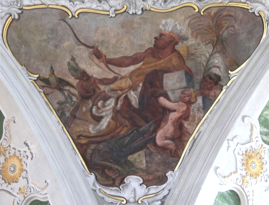 Zwickelbild in der Jesuitenkirche in Mannheim. Darstellung: Amerika